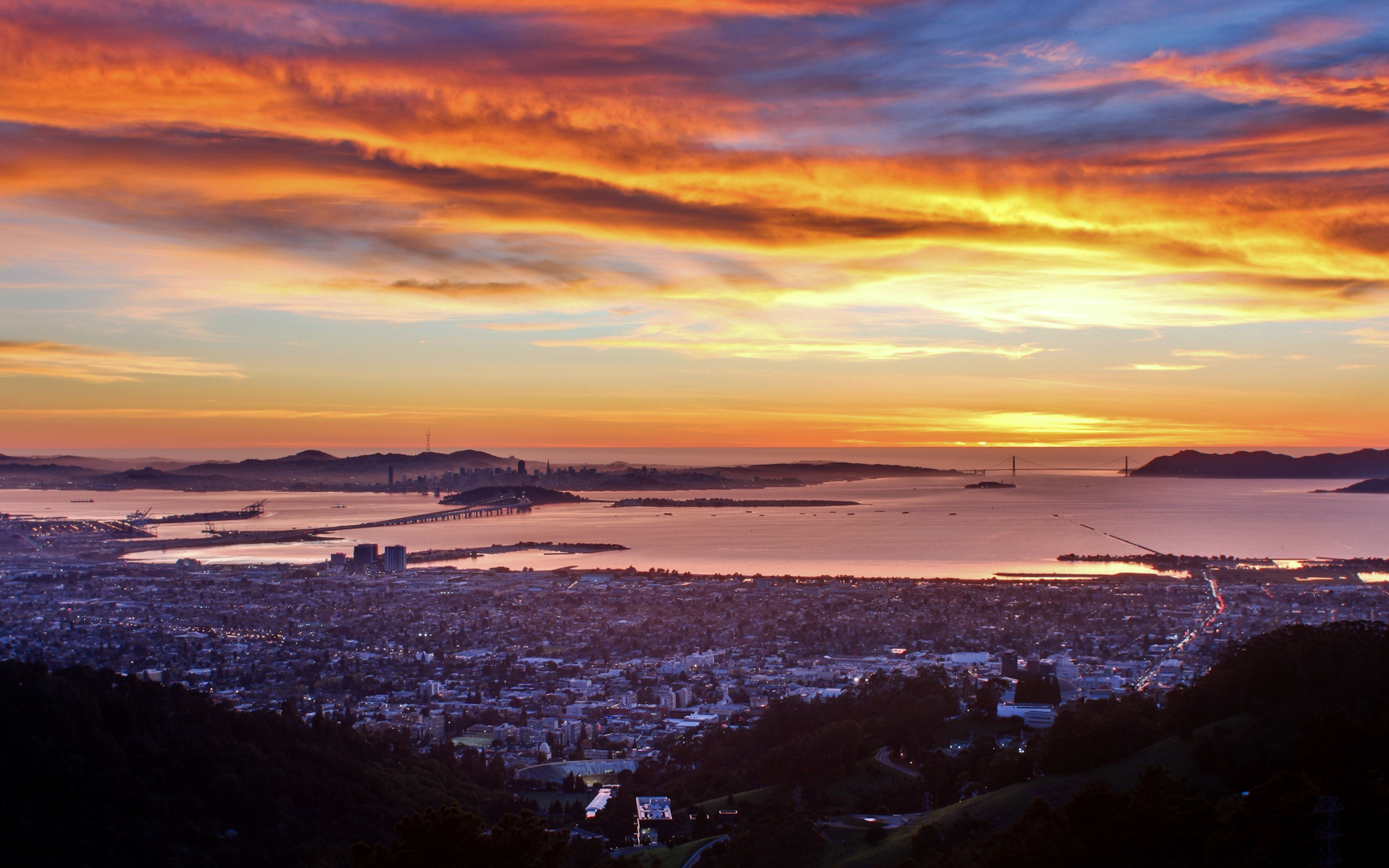 Berkeley Sunset